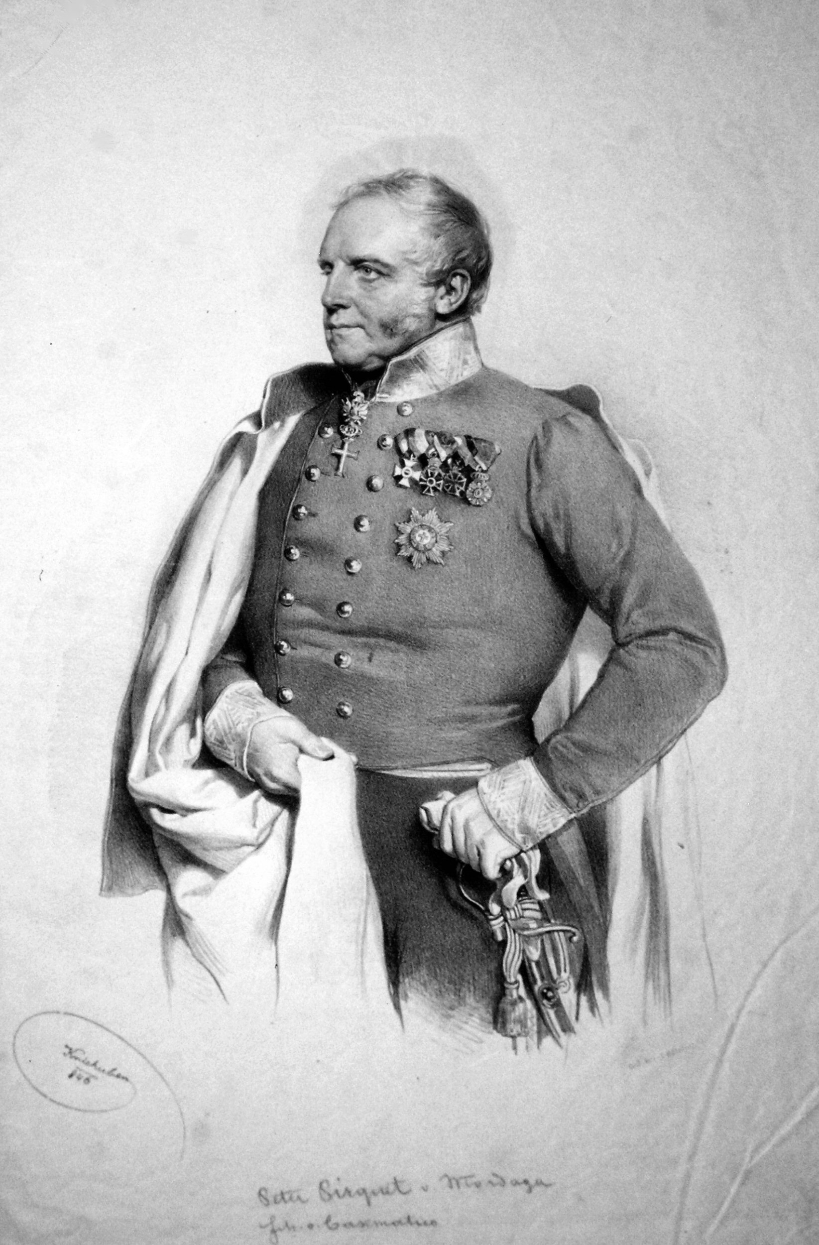 Peter von Pirquet (1781-1861), Freiherr von Cesenatico, Feldteugmeister, Ritter des Maria-Theresien-Orden, Kapitän der Arcierenleibgarde. Lithographie von Josef Kriehuber, 1846